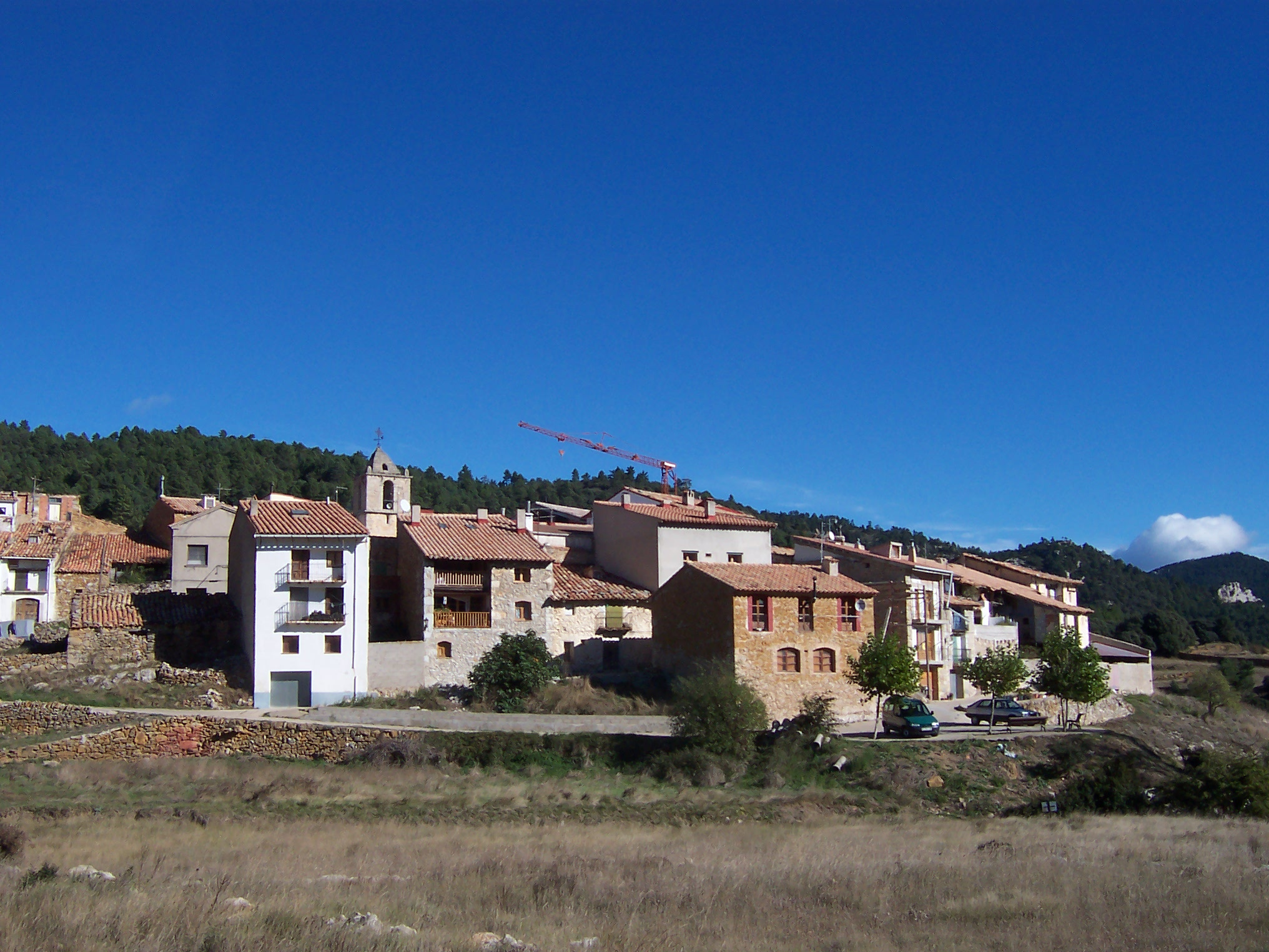 Vista general del pueblo de Fredes (17/10/2004). Autor: José F. Català Senent